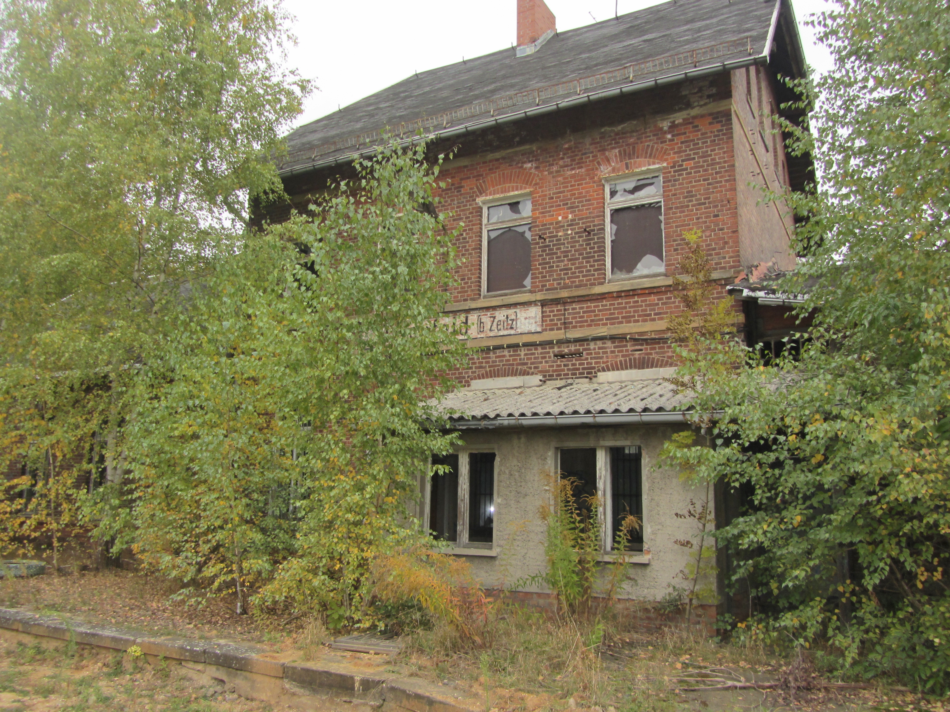 Bahnhof Osterfeld an der ehemaligen Bahnstrecke Zeitz-Camburg